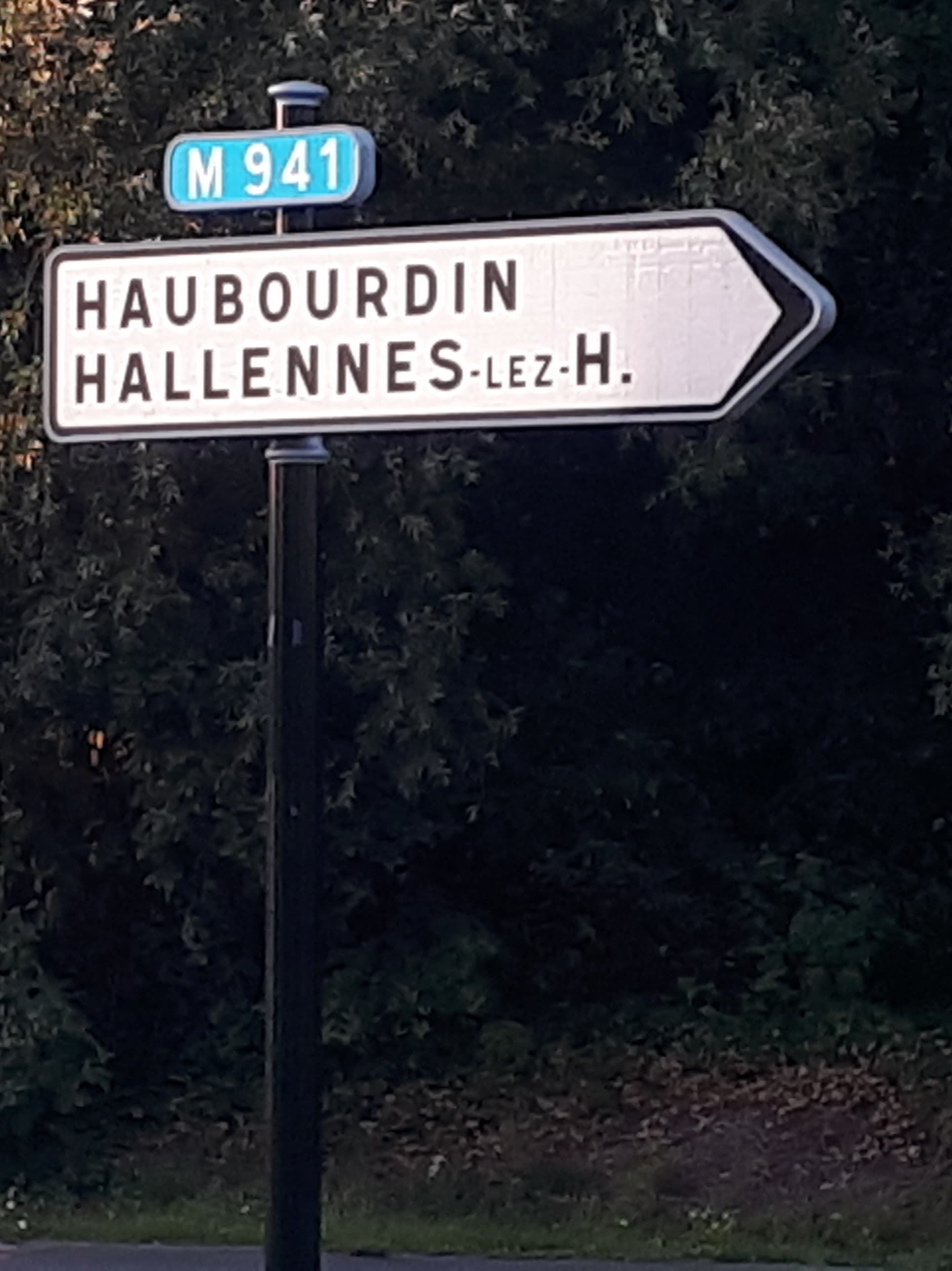 Panneau routier indiquant la direction Haubourdin et Hallennes-lez-Haubourdin surmonté du cartouche M941 (route métropolitaine) anciennement D941 (photo prise le 19/08/2019)